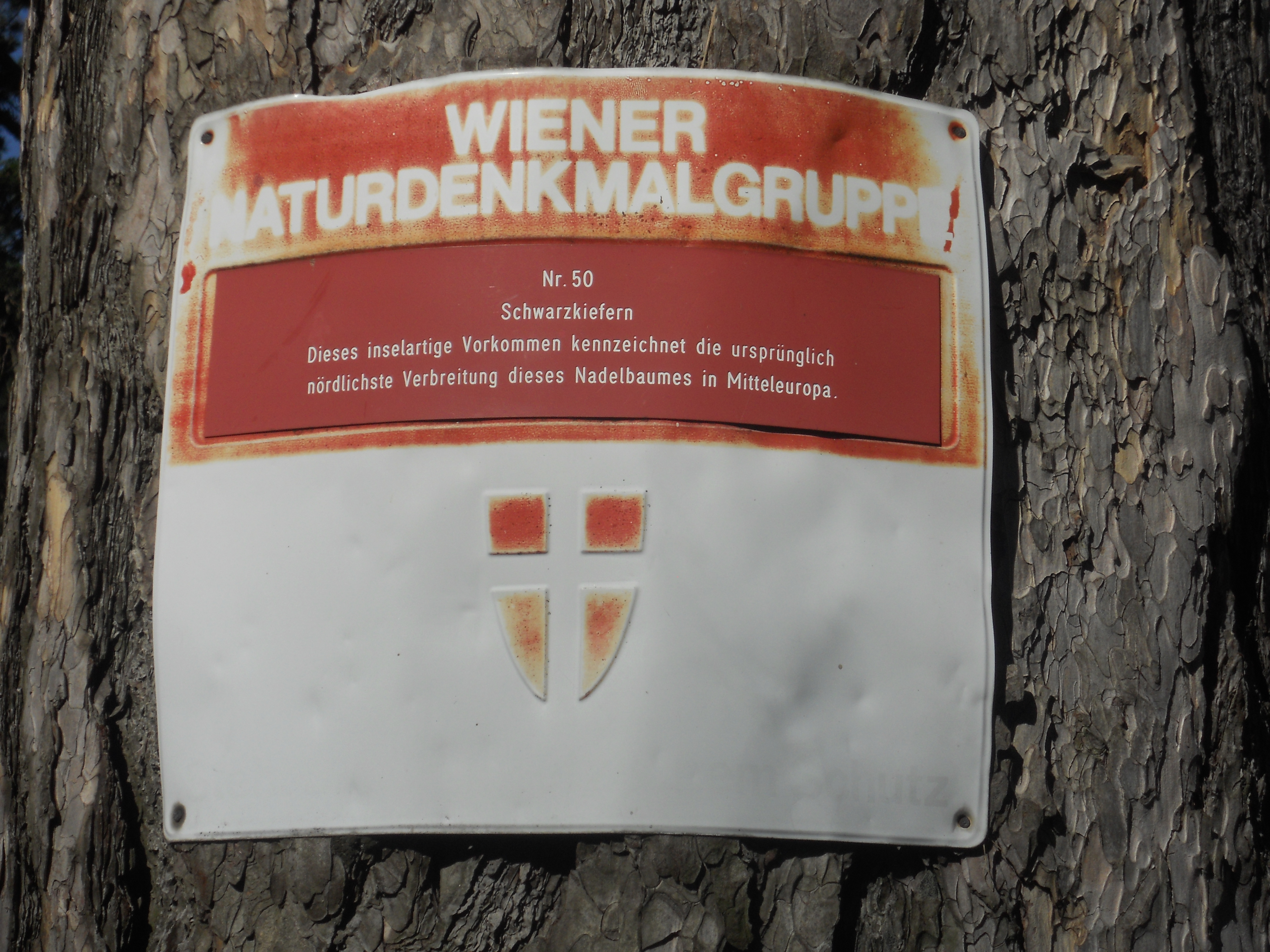 mehrere Kieferngruppen im Krapfenwaldlbad This media shows the natural monument in Vienna with the ID 50.